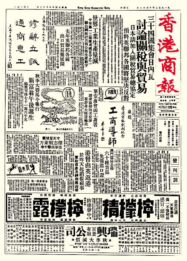 商報創刊號